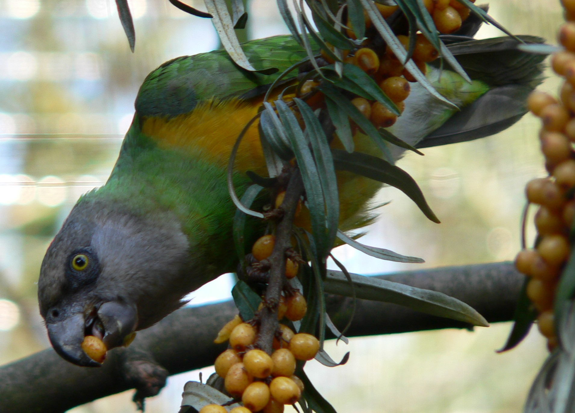 Poicephalus senegalus